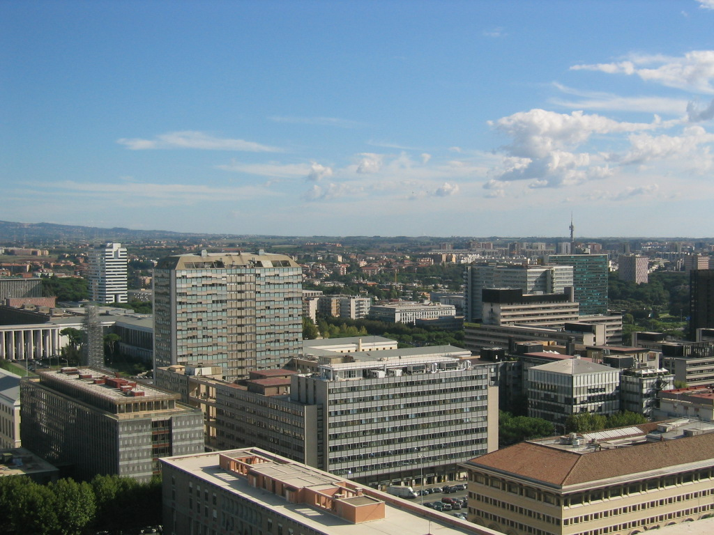 Veduta aerea dell'EUR.